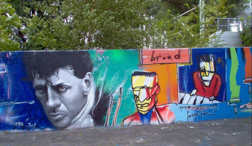 Deze foto van de Herman Brood-graffiti ter nagedachtenis van Brood, is op 24 augustus 2004 genomen door Ken. De foto is genomen bij de Irenetunnel, één van de legale graffiti-plaatsen in Delft. De graffiti-artist van deze foto is Zest, ook bekend van de herdenkingspiece voor Dondi White. Ik weet niet in hoeverre een graffititekening onder auteursrechtenbescherming staat. Vandaar dat ik "geen licentie bekend" heb aangevinkt.